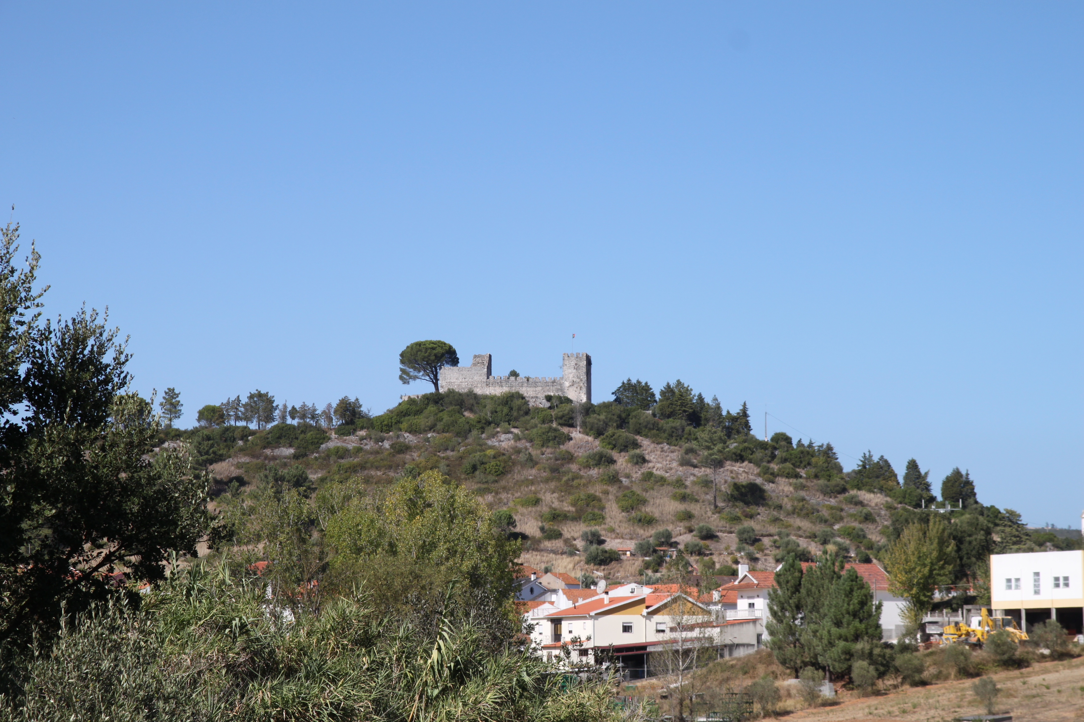 Castelo de Alcanede (ruínas) This file was uploaded for Wiki Loves Monuments in Portugal with the unique identifier 73606.